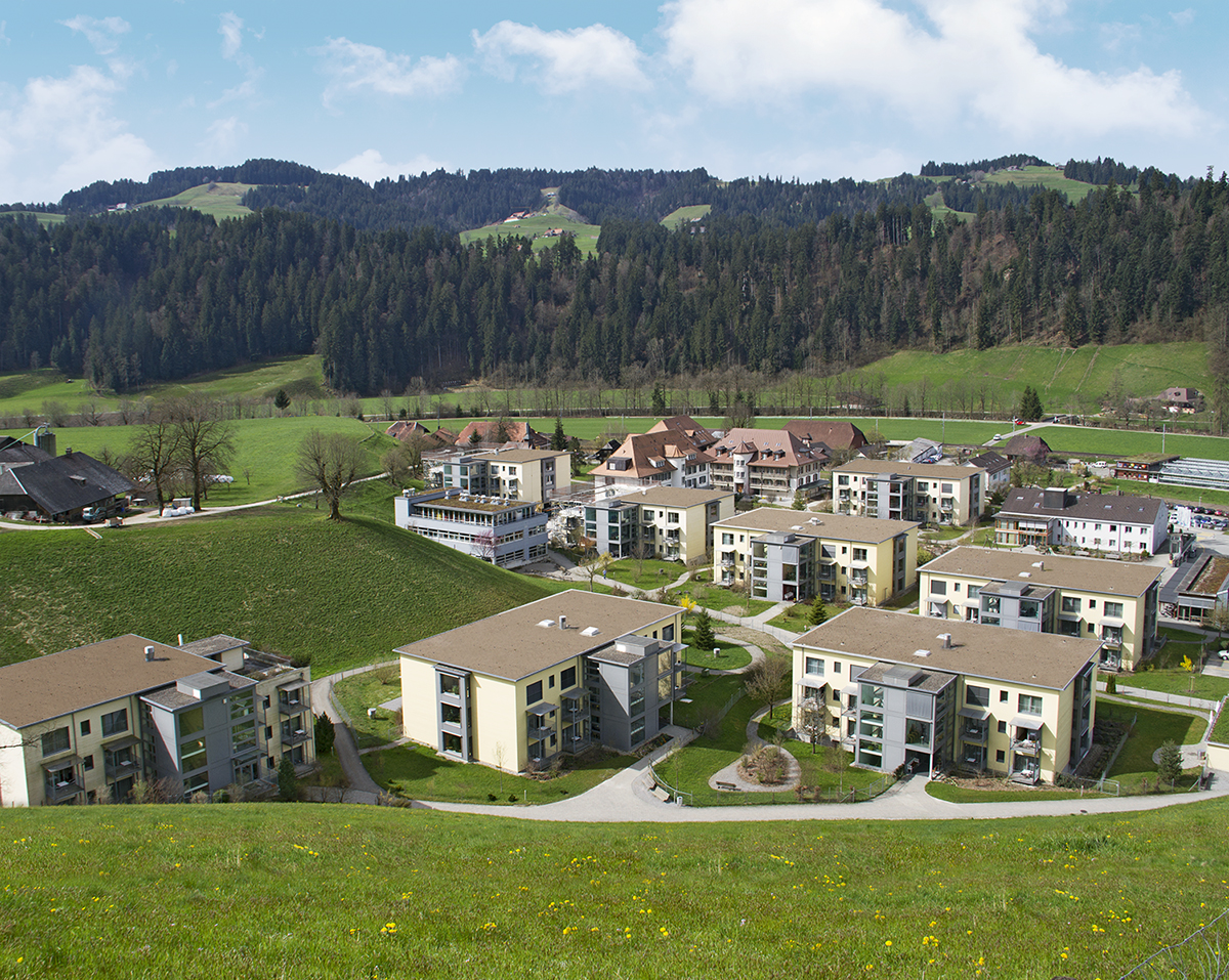 14 unterschiedliche Wohnhäuser in Bärau für Menschen im Alter und für beeinträchtigte Menschen